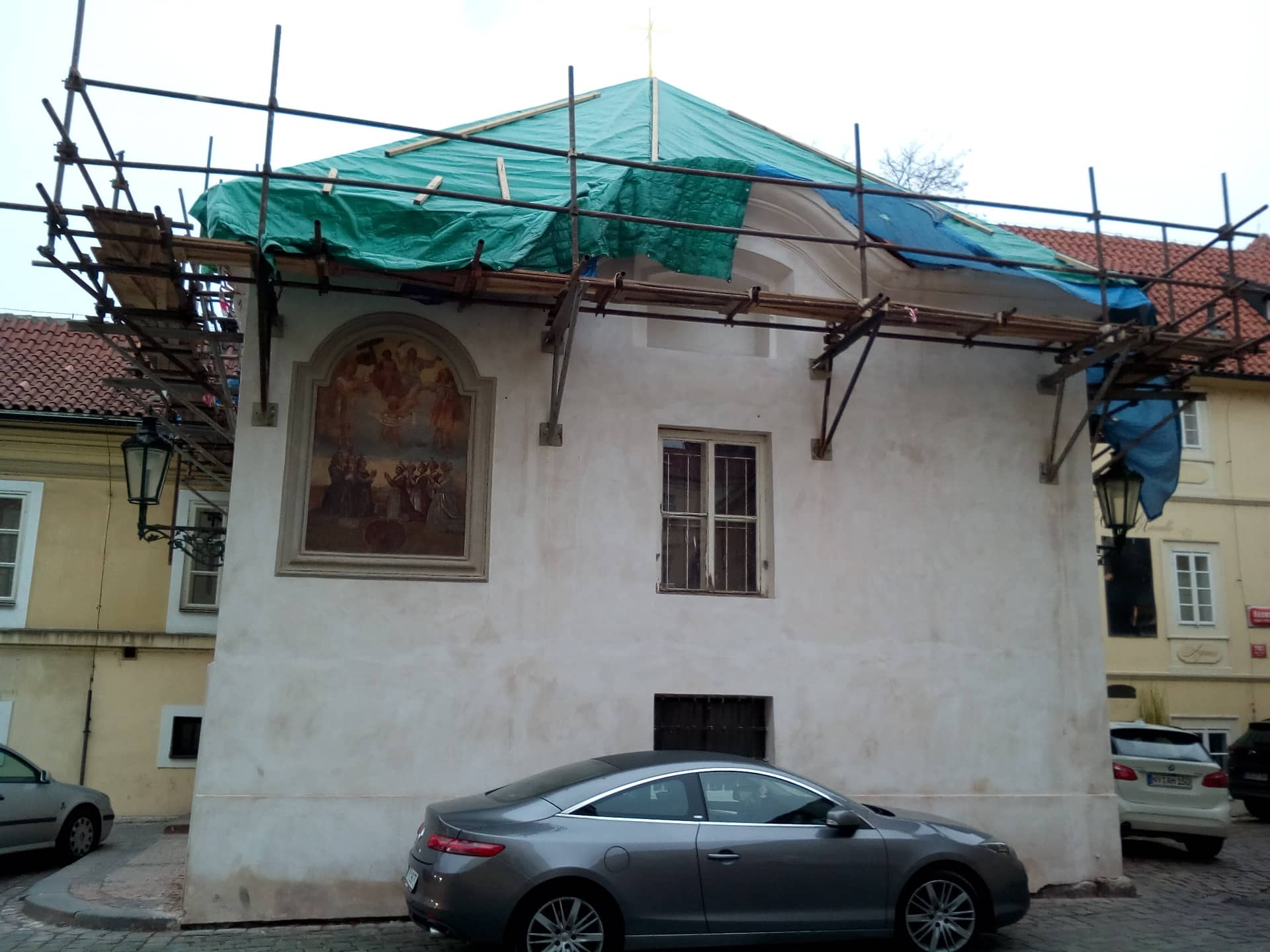 Haštalská kostnice s nástěnnou malbou Nejsvětější Trojice - jižní průčelí